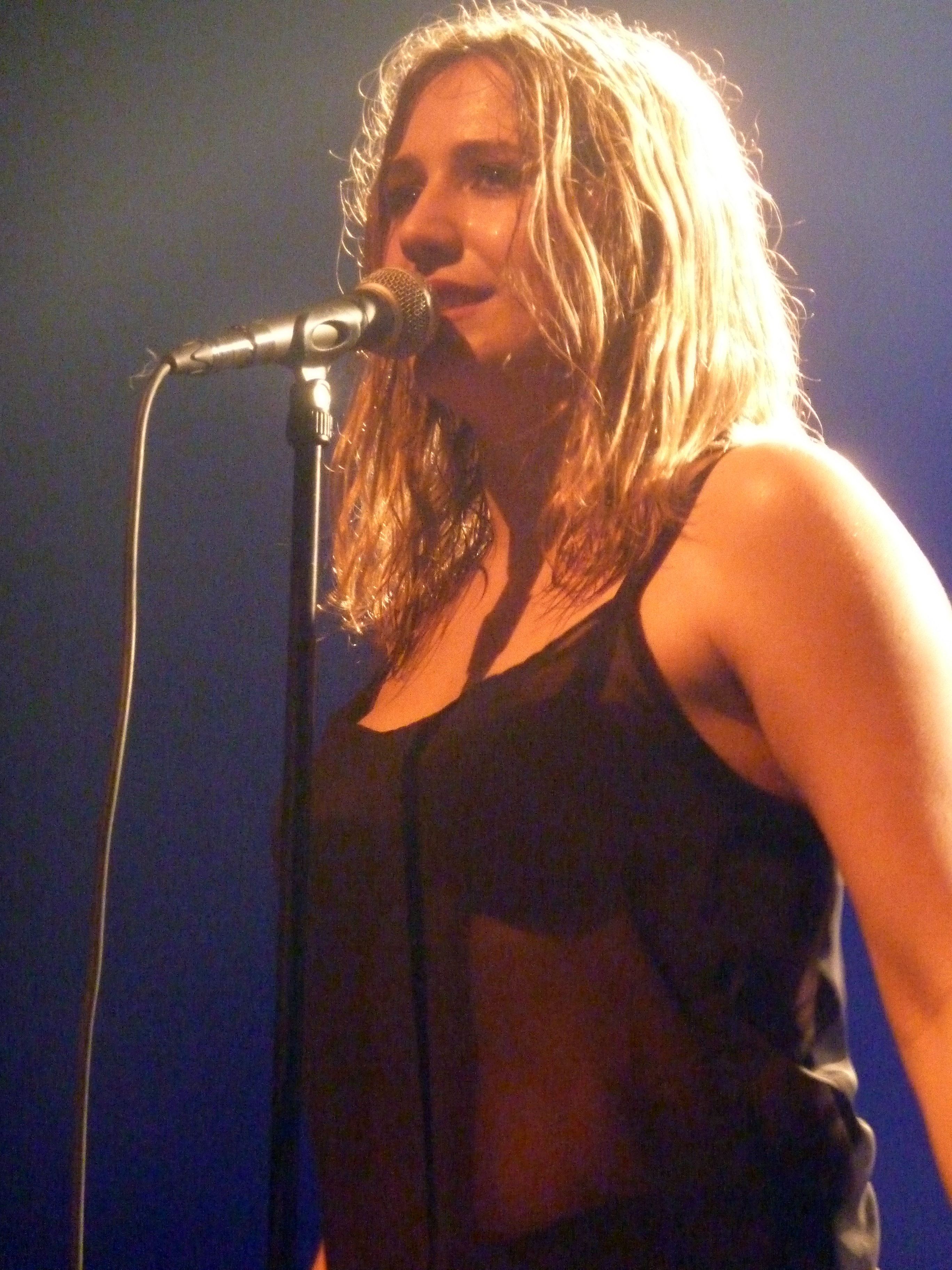 Izia en concert au casino de paris le 15/03/2012